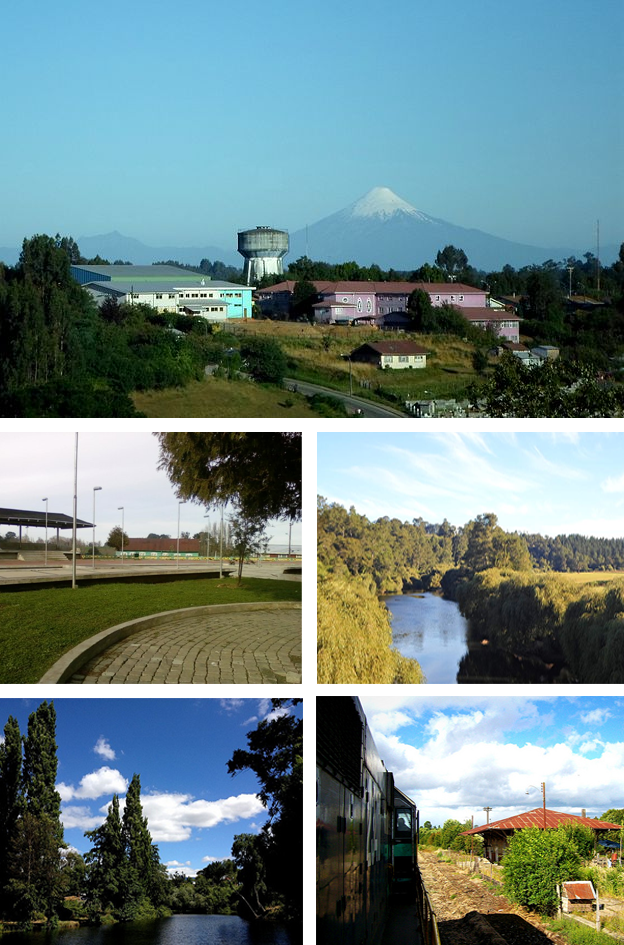 Montaje de la comuna de Rio Negro usando imagenes de Wikimedia Commons y de Flick con licencia Creative Commons Superior: Volcán Osorno desde Río Negro Superior Izquierda: Plaza de Armas de Río Negro Superior Derecha: El rio Negro desde Puente Chapaco Inferior Izquierda: Sector La Toma Inferior Derecha: Tramo Tren Río Negro-Osorno